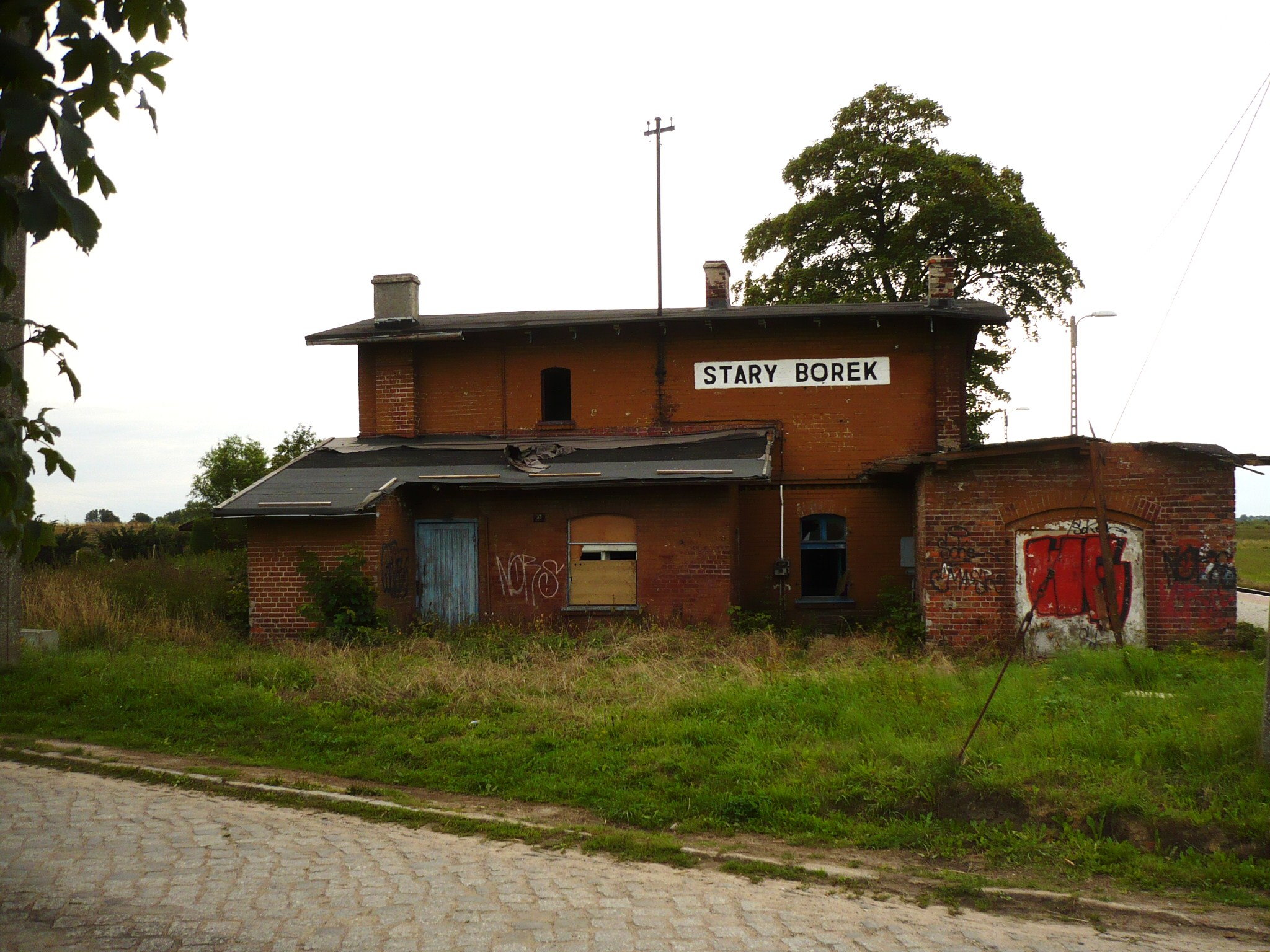 Stary Borek, stacja kolejowa